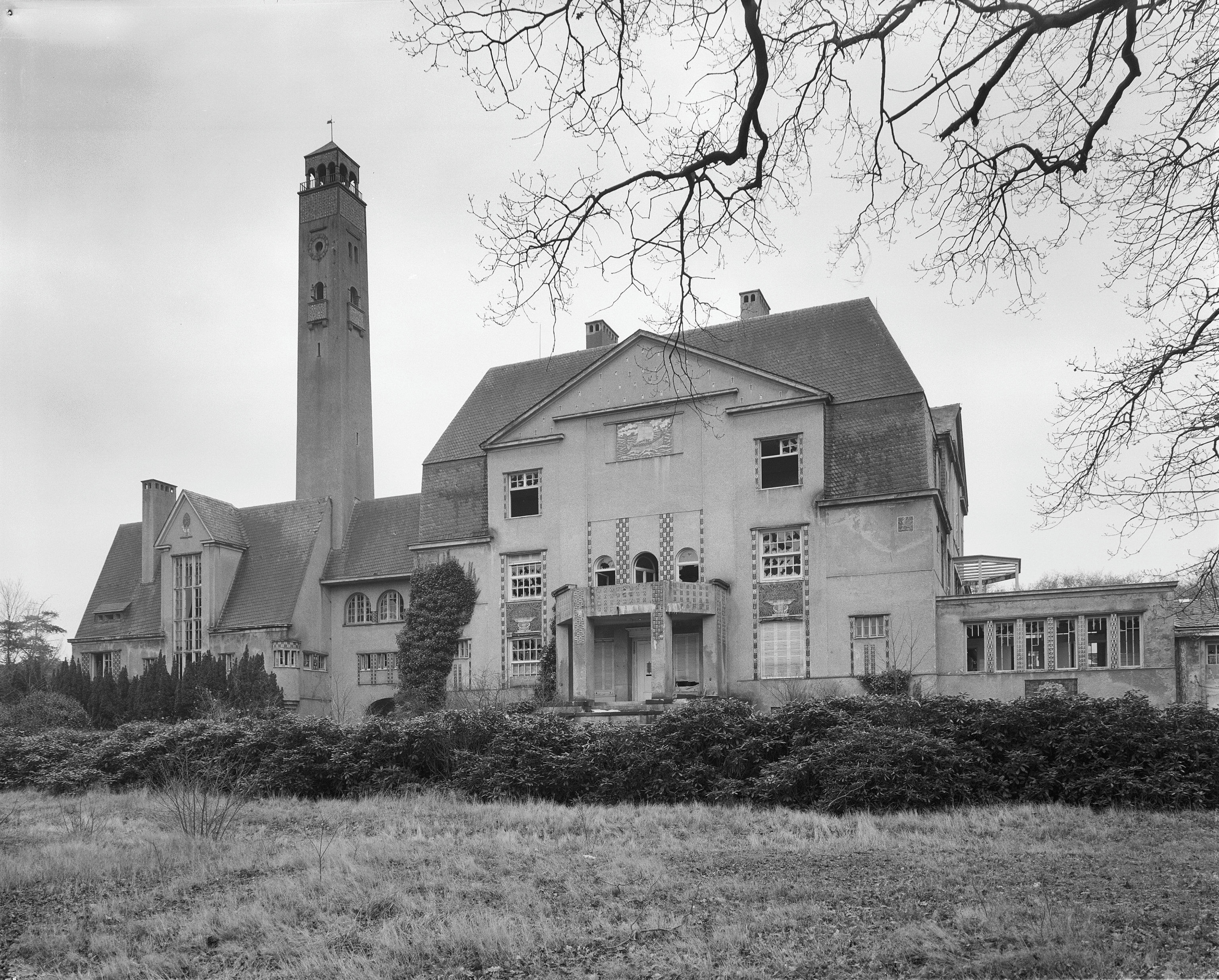 Landhuis Kareol: voorgevel